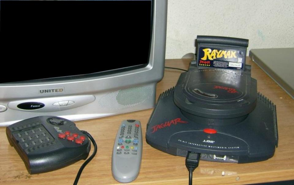 Atari Jaguar mit CD-Aufsatz und ProController. Selbst fotografiert am 27.09.2006